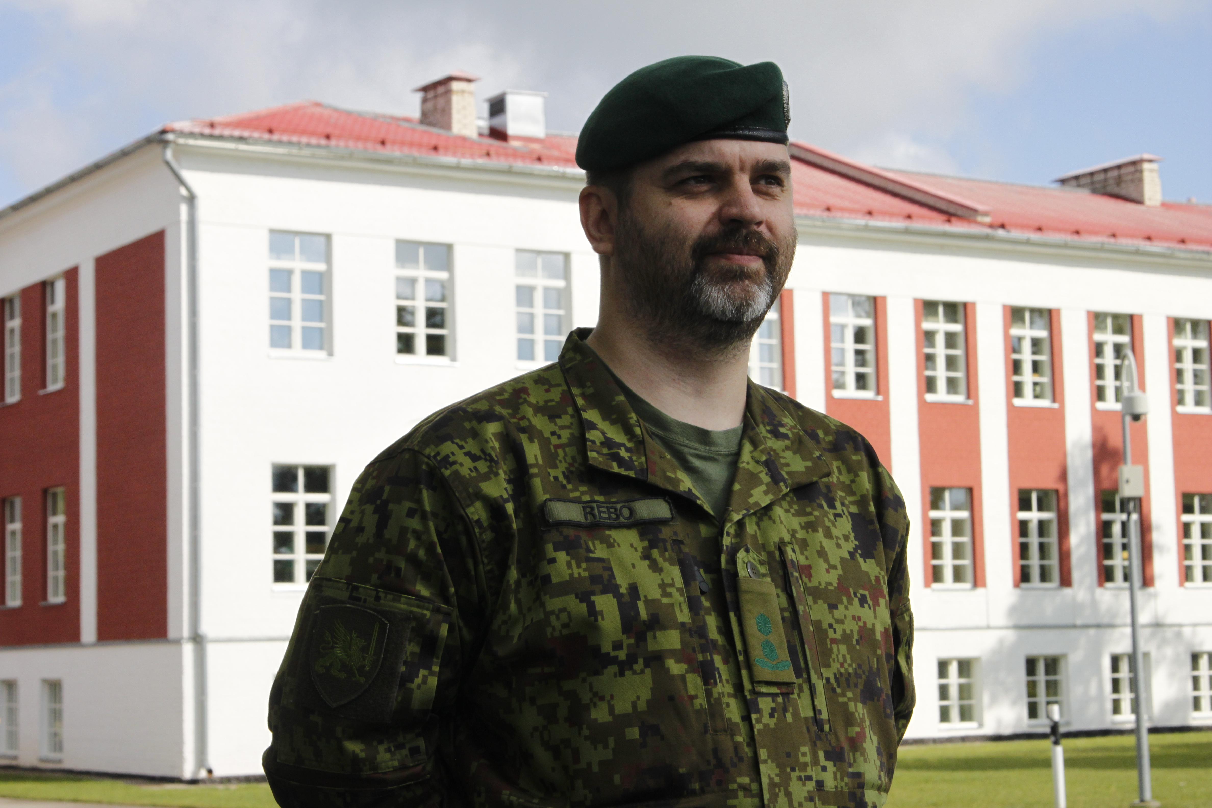 2. jalaväebrigaadi ülem